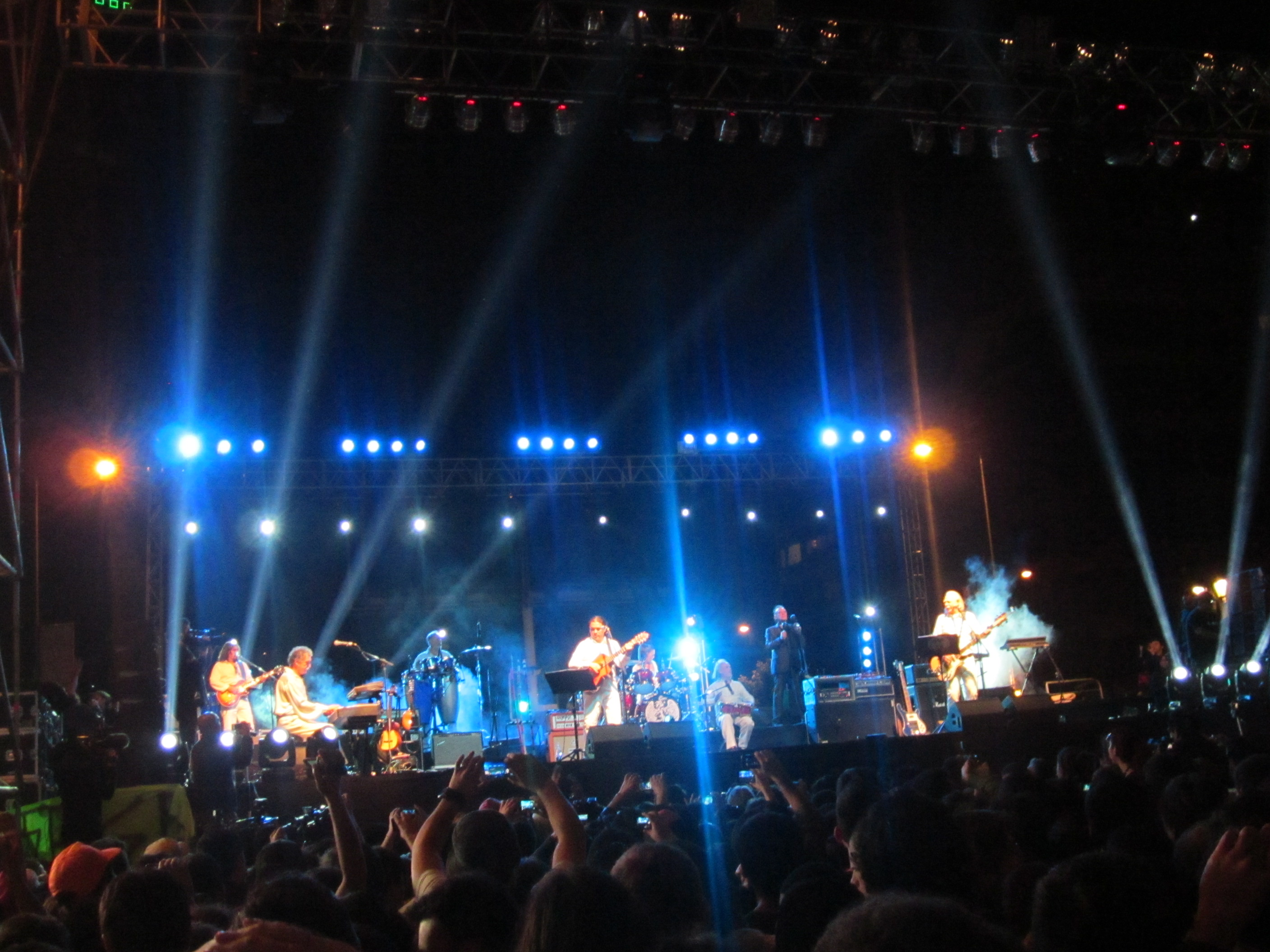 Presentación del grupo Los Jaivas frente al Museo de Bellas Artes, en el Parque Forestal de Santiago de Chile en la conmemoración de los 50 años del grupo